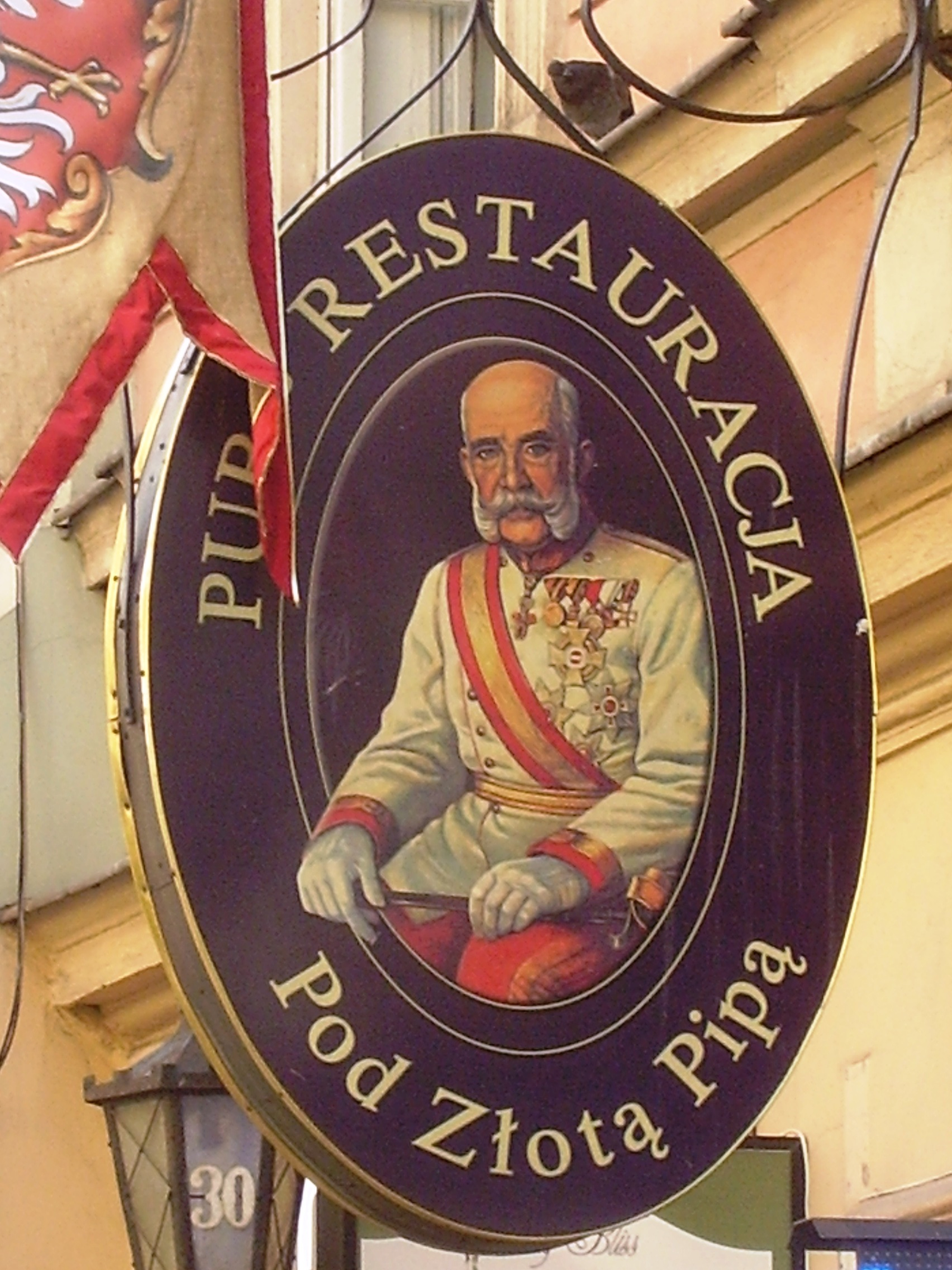 Kraków, Floriańska 30